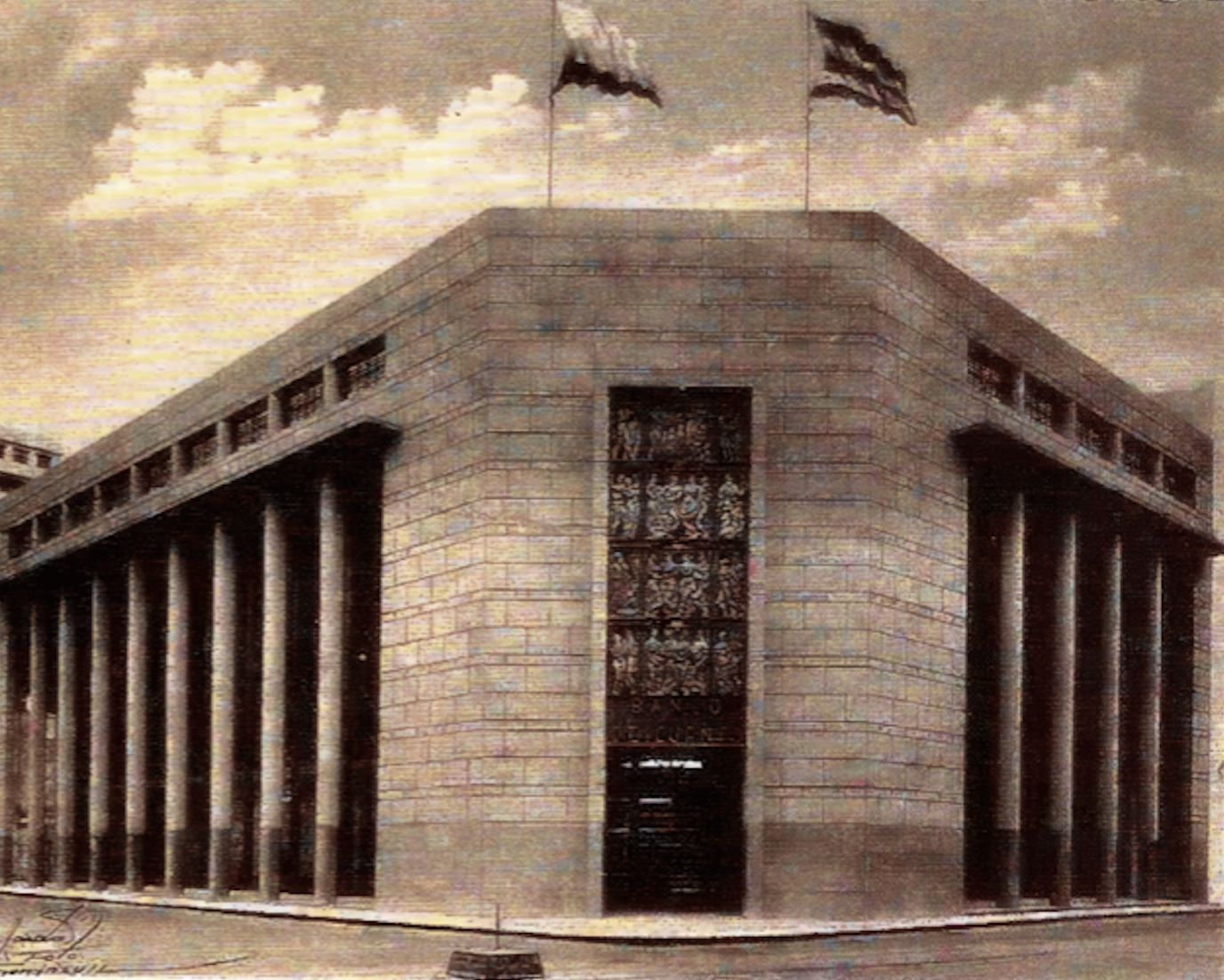 Das Gebäude von 1954 gilt als eine perfekte Symbiose zwischen dem europäischen Rationalismus und den Karl Kohn beeindruckenden lokalen Traditionen. 2018 wurde das Bankgebäude als Bibliothek der Universität der Künste (Universidad de las Artes) von Guayaquil wiedereröffnet.